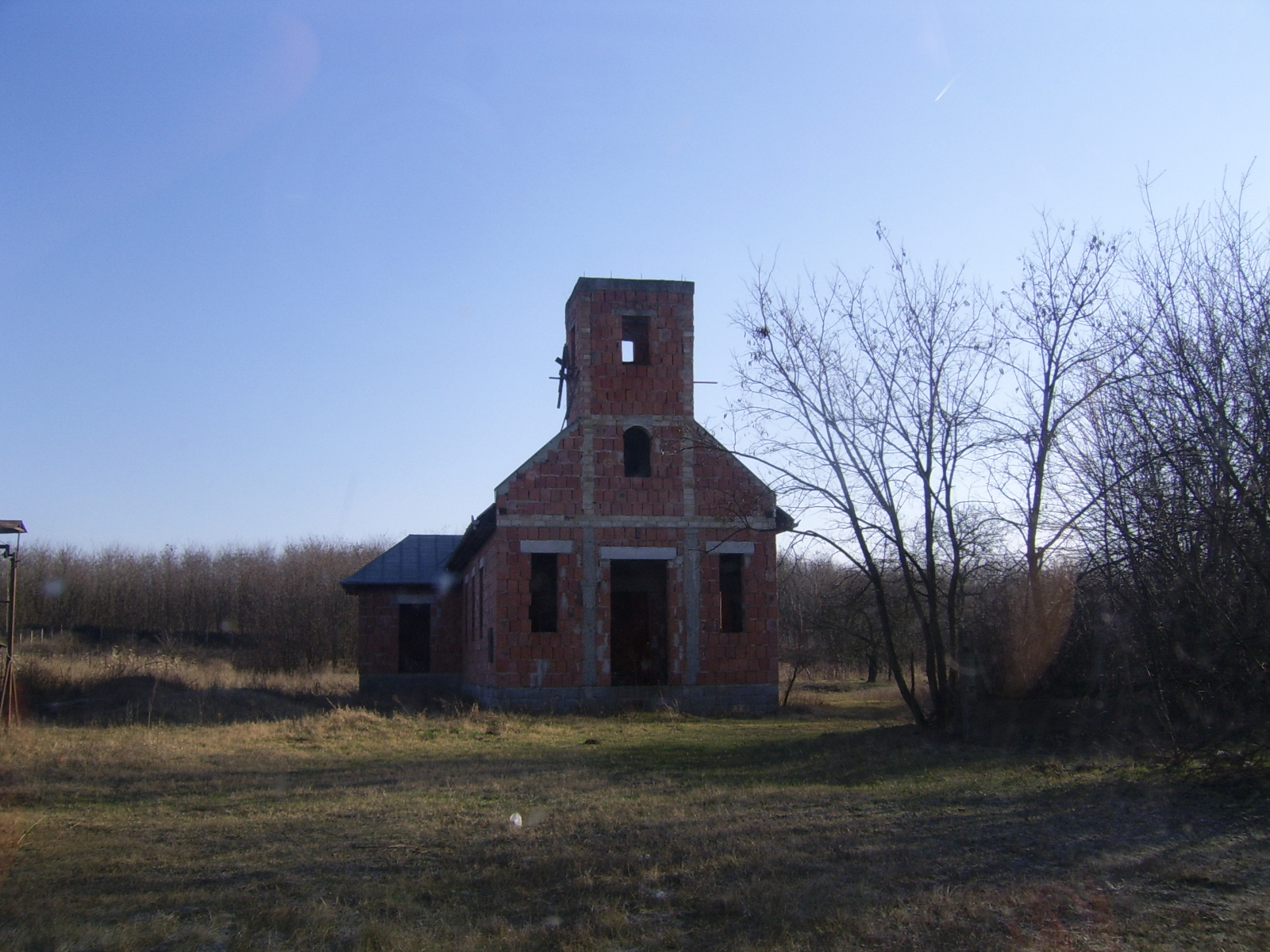 A béke-telepi épülő római katolikus templom. Valamikor az 1990-es évek végén kezdték el az építését, de 2000-ben abbamaradt.